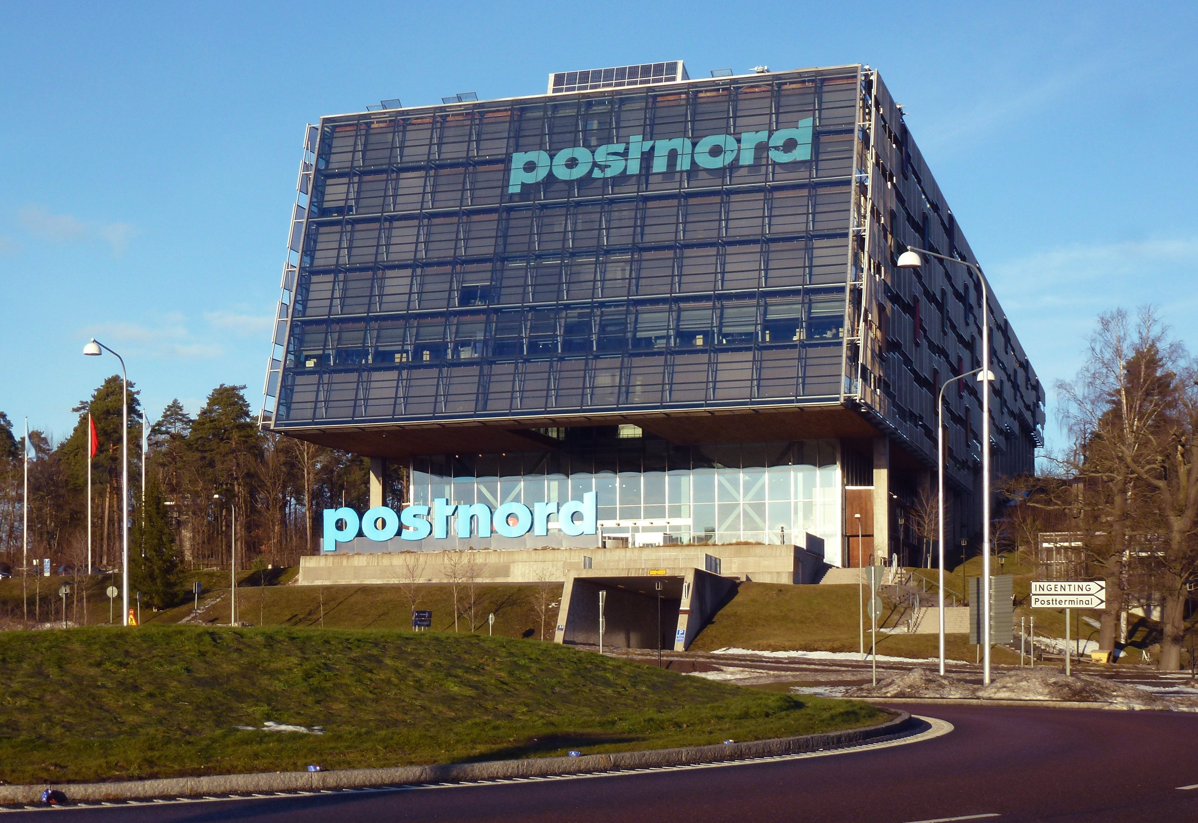 Postnords byggnad i Solna